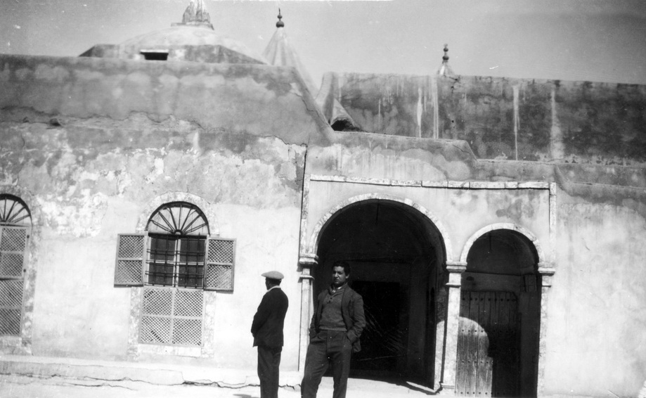 1933, מסע תמרים לעיראק, מוסול נינווה ליד קבר יונה הנביא. - בן ציון ישראלי